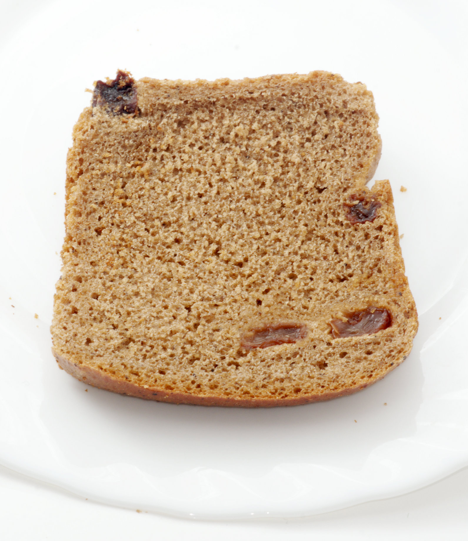 кусок карельского хлеба (чёрный хлеб с изюмом)